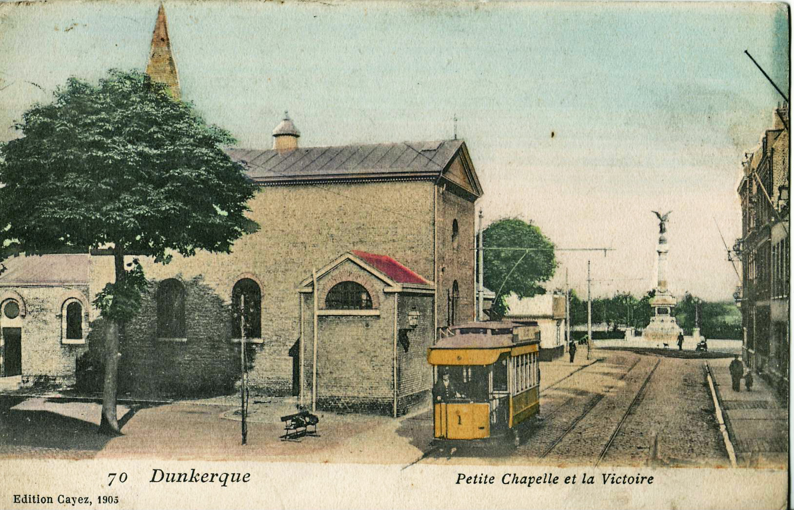 Carte postale éditée par Cayez, n°70 :DUNKERQUE - Petite Chapelle et la Victoire